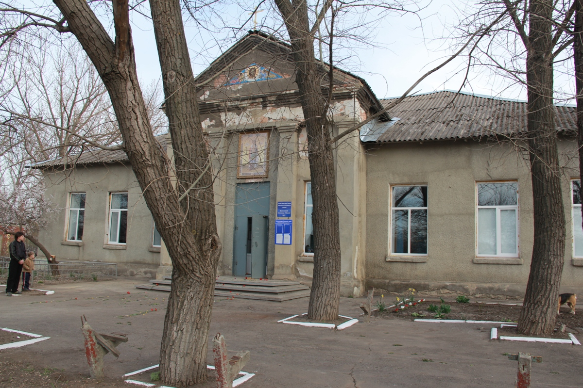 Храм Александра Невского. Расположен в городе Красный Сулин, Красносулинский район, Ростовская обл.